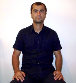 Махмуд Гурбанов (футболист)